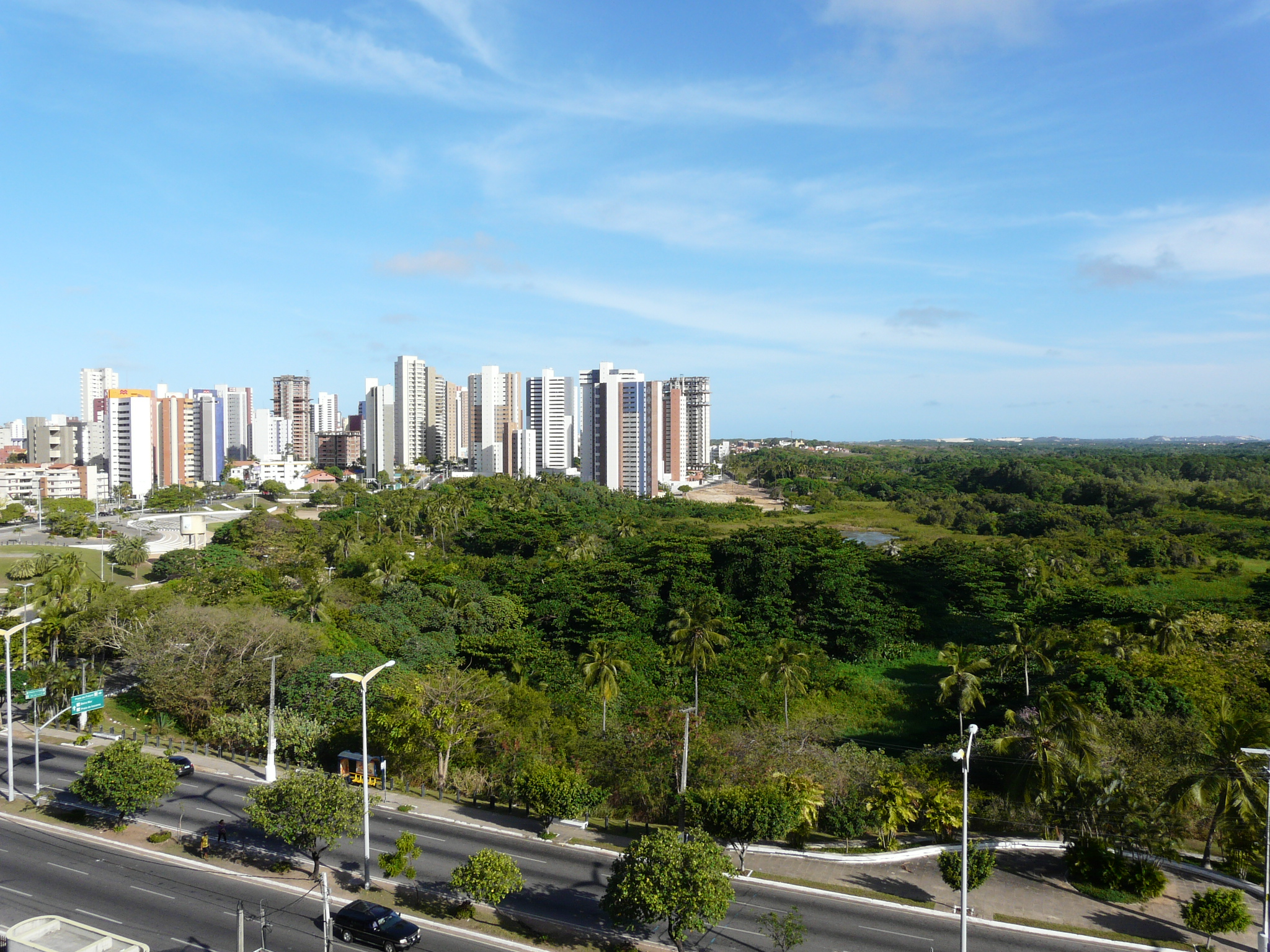 Parque do Cocó, Fortaleza, Ceará, Brasil